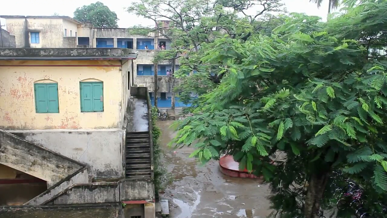 বিদ্যালয়ের মাঠ